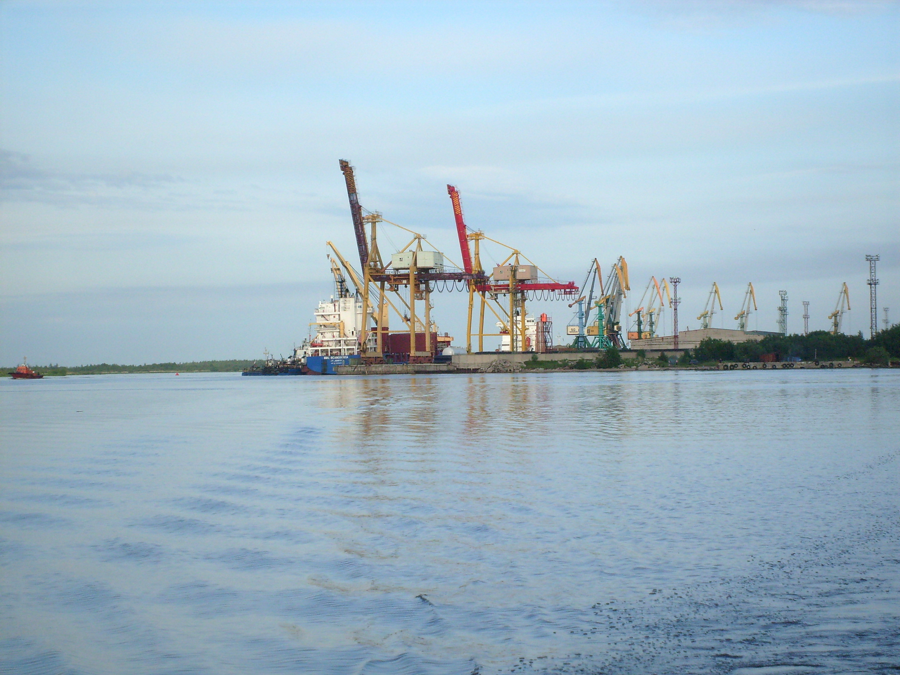 Архангельский морской порт - Экономия